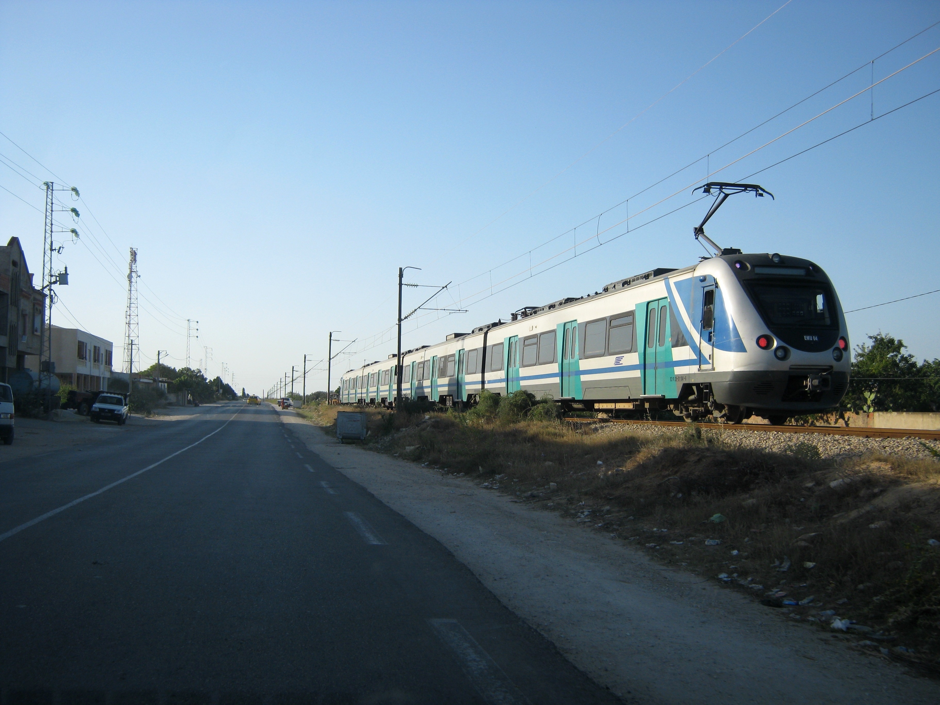 Типовая тунисская электричка на перегоне близ города Махдия